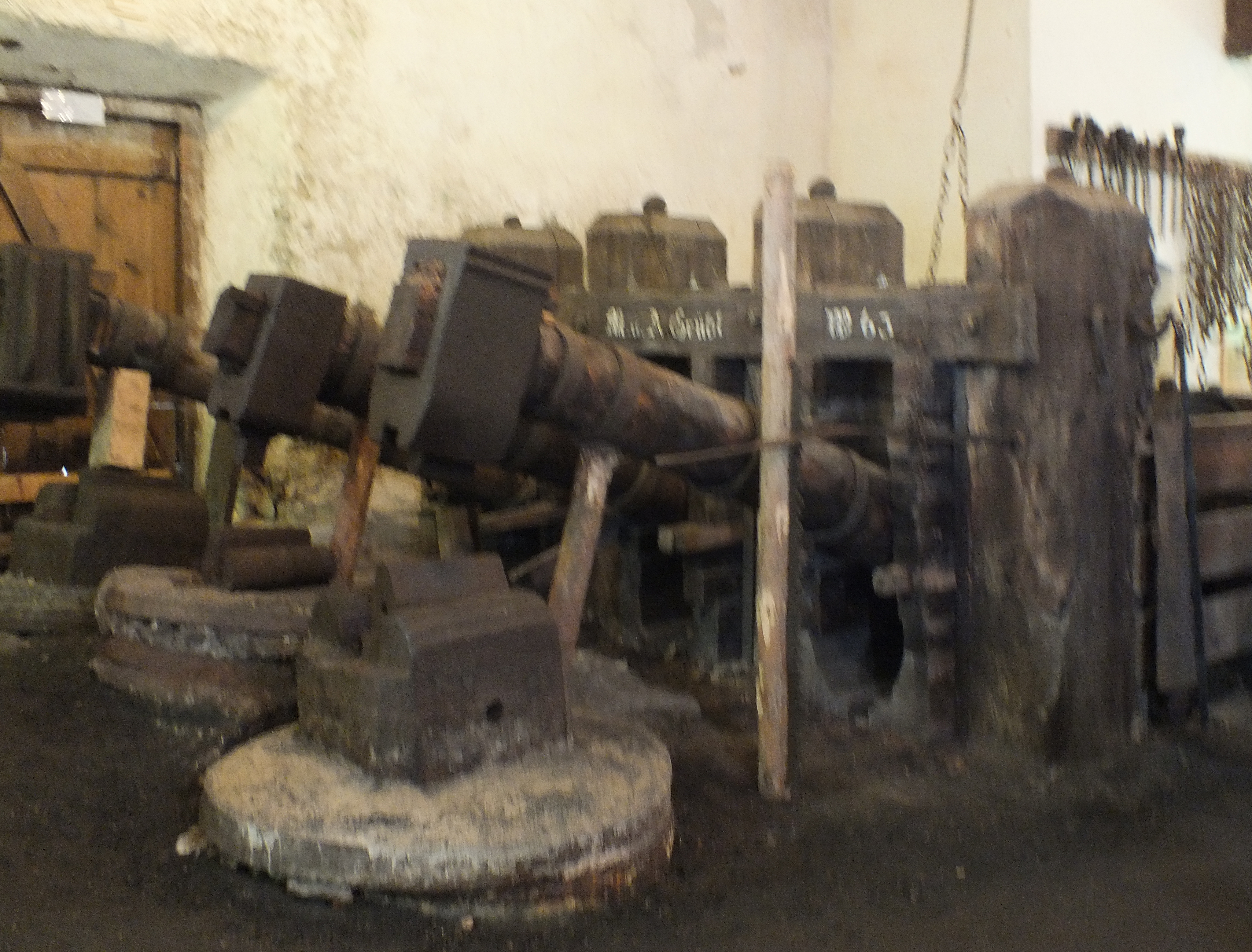 Glockenschmiede und Museum Ruhpolding: die drei Schwanzhämmer